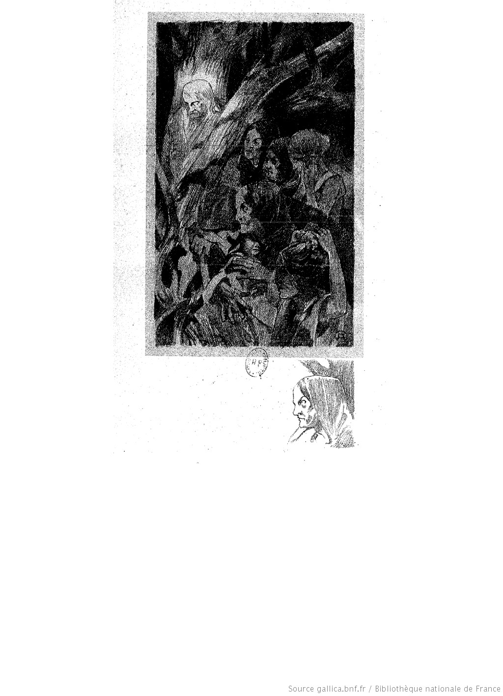 Auguste Donnay illustration pour Les aveugles de Maurice Maeterlinck (1862-1949) in Théâtre de Maurice Maeterlinck, illustré par Auguste Donnay, (1862-1921) Date d'édition : 1901-1902 (BNF/Gallica)